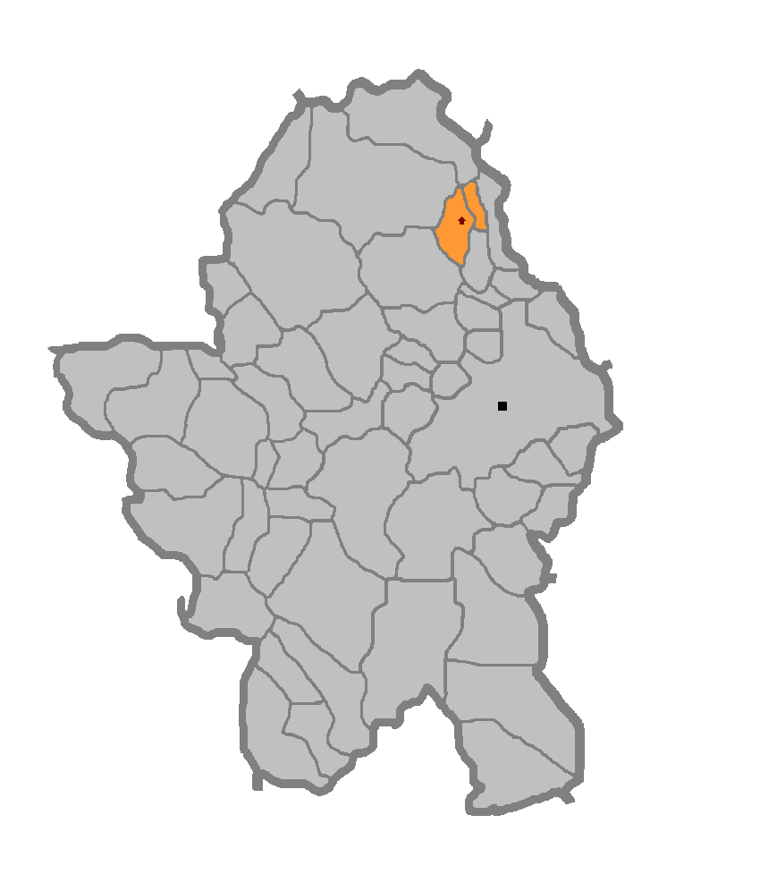 Мјесна заједница Пријаковци